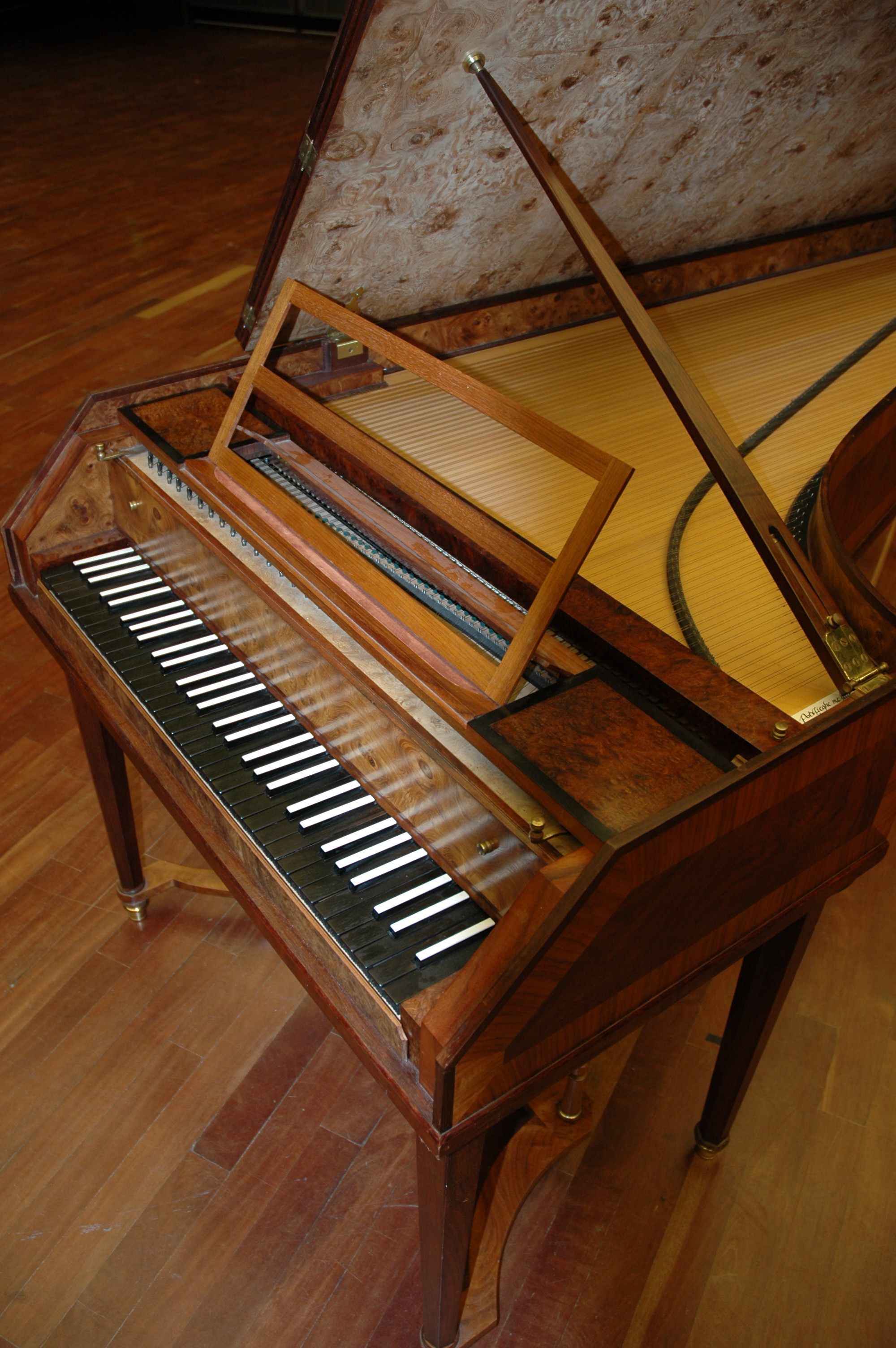 Tangentenflügel, Kopie eines italienischen Instruments von Dierik Potvlieghe Dieses Bild wurde unter der GNU-Lizenz für freie Dokumentation veröffentlicht. Es ist erlaubt, das Bild unter den Bedingungen der GNU-Lizenz für freie Dokumentation, Version 1.2 oder einer späteren Version, veröffentlicht von der Free Software Foundation, zu kopieren, zu verbreiten und/oder zu modifizieren. Es gibt keine unveränderlichen Abschnitte, keinen vorderen Umschlagtext und keinen hinteren Umschlagtext.